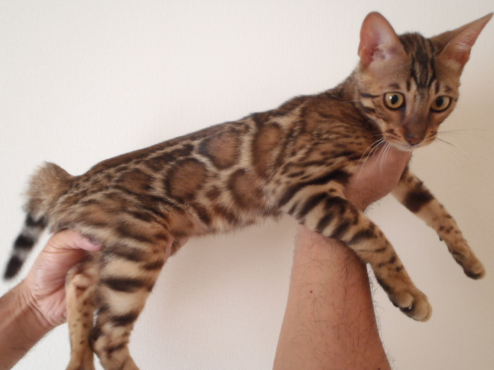 nekomine hotaruko